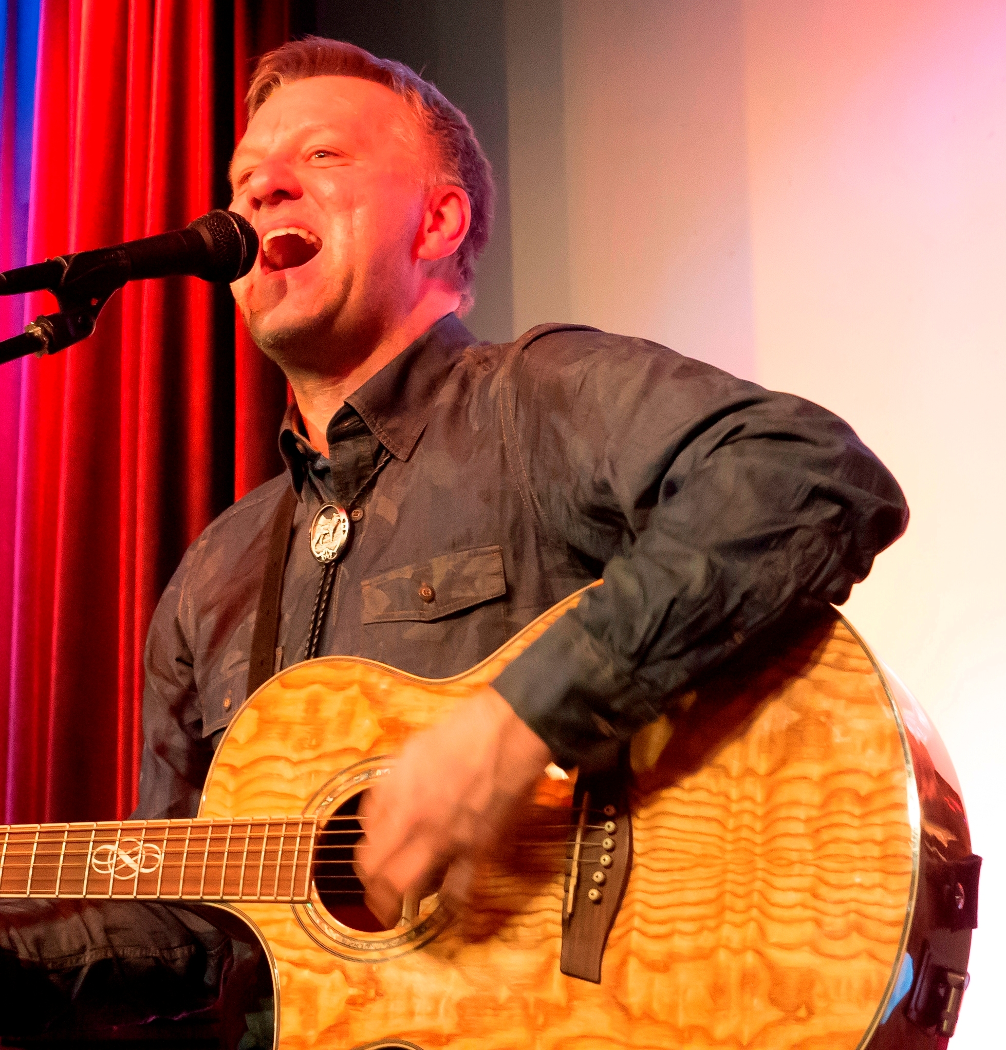 Frank Bülow bei einem Liveauftritt